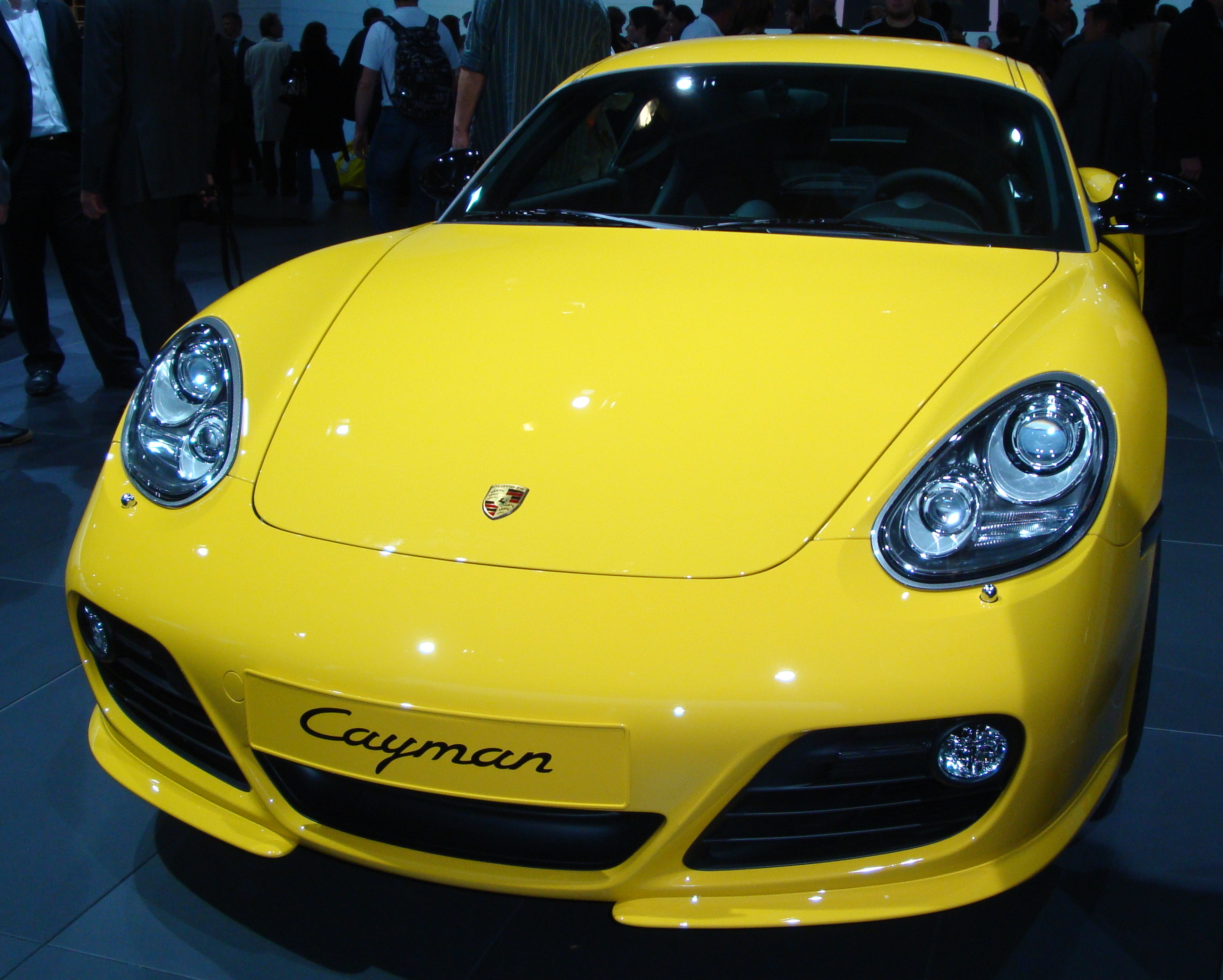 Porsche Cayman Paris 2010